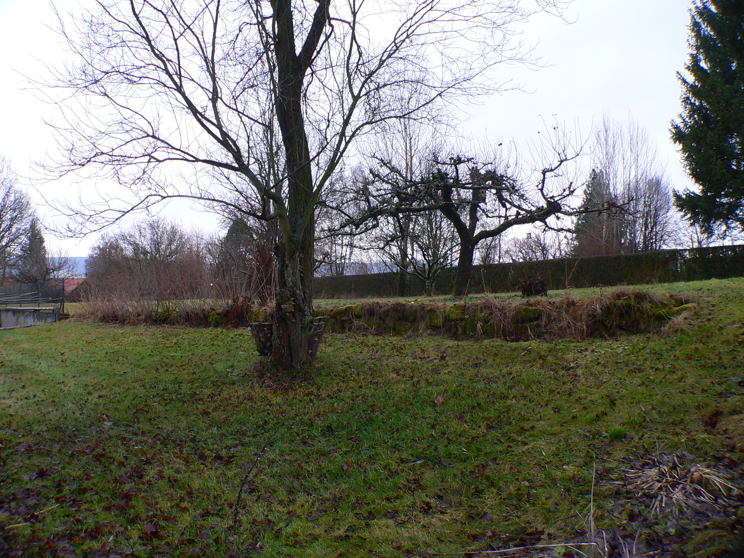 Hofgut Melanger in Küps, Bayern, Regierungsbezirk Oberfranken, Landkreis Kronach – Bodendenkmal (Mauerreste)